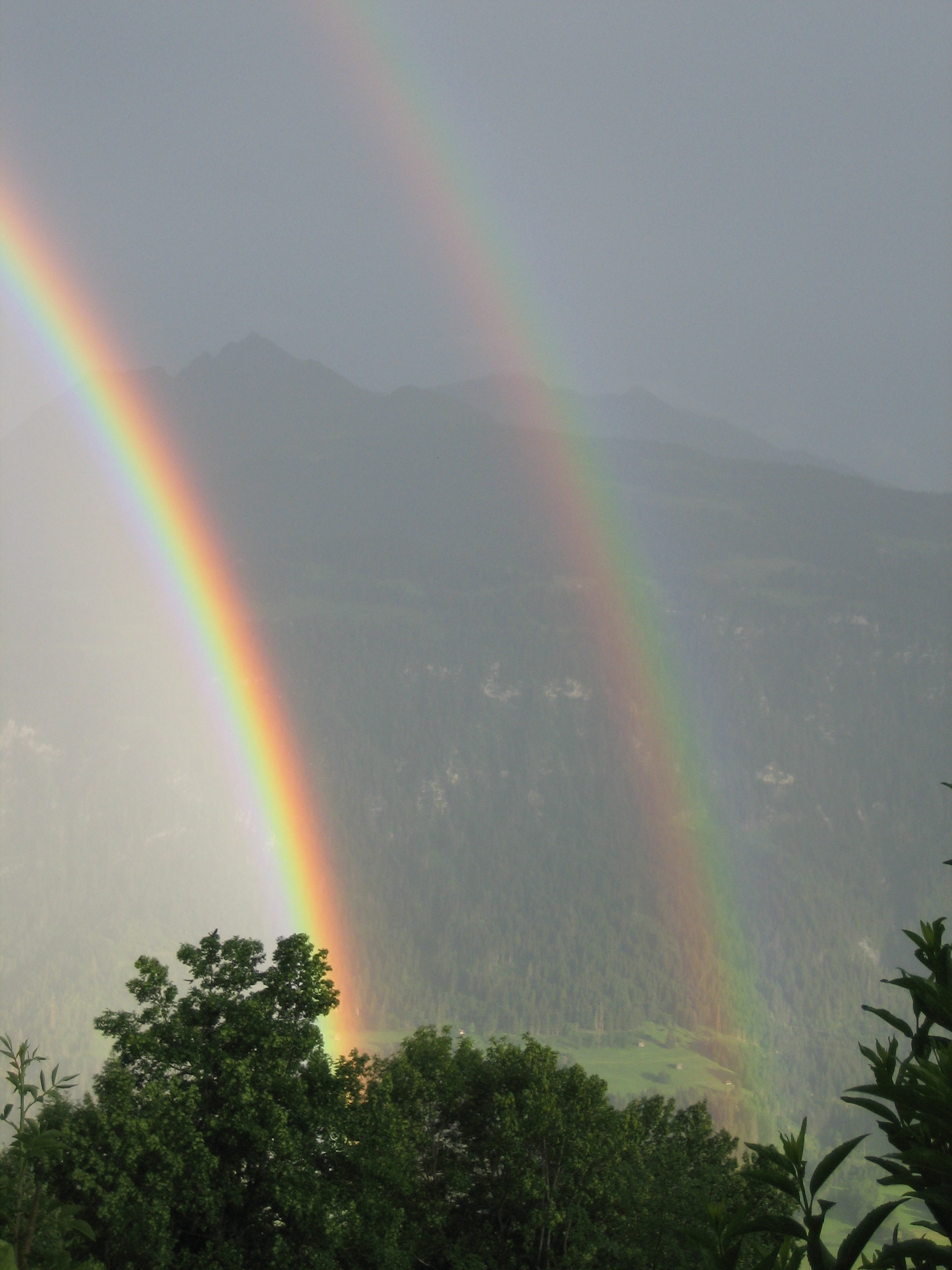 Regenbogen bei Falera